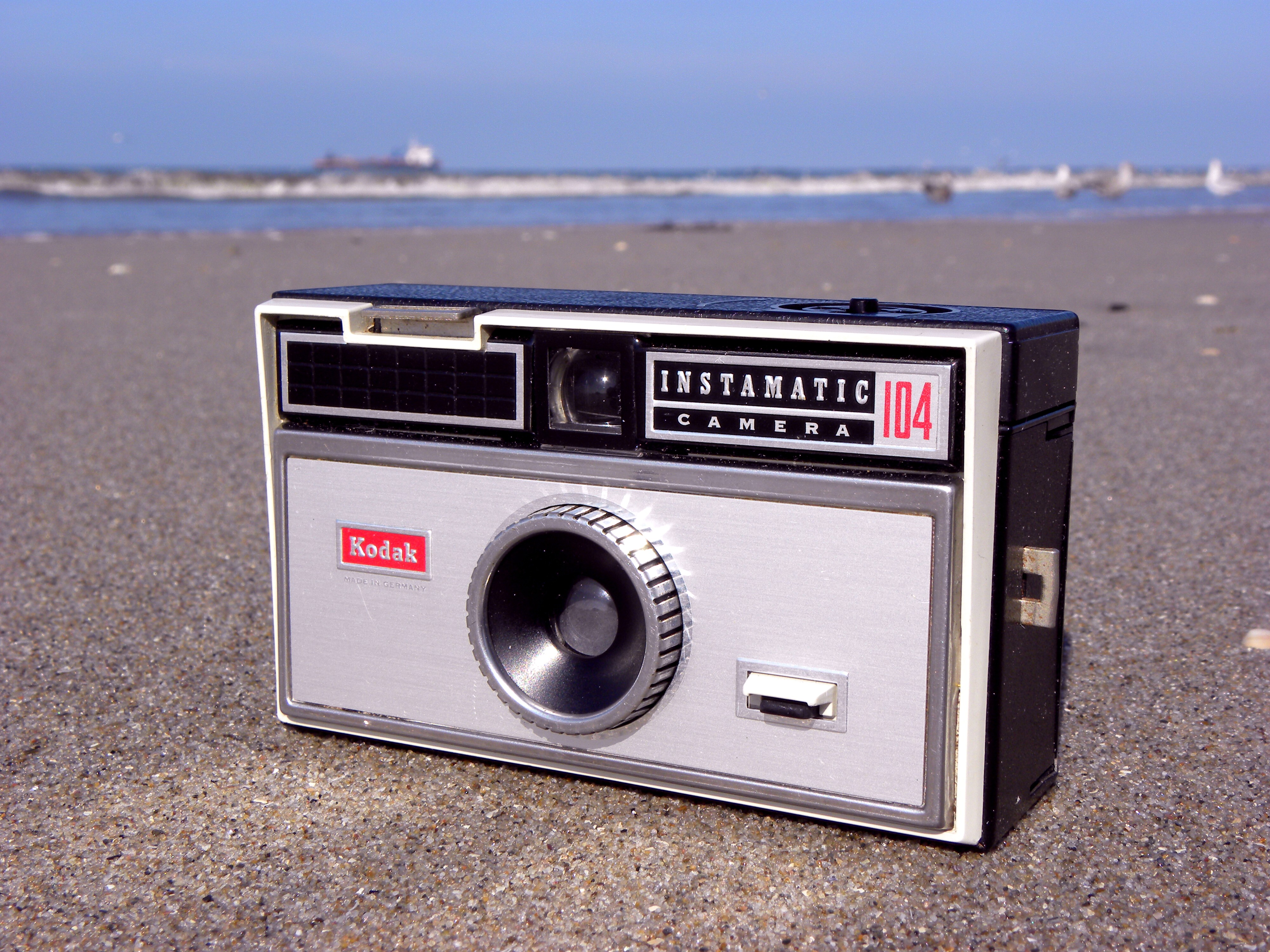 Kodak Instamatic 104